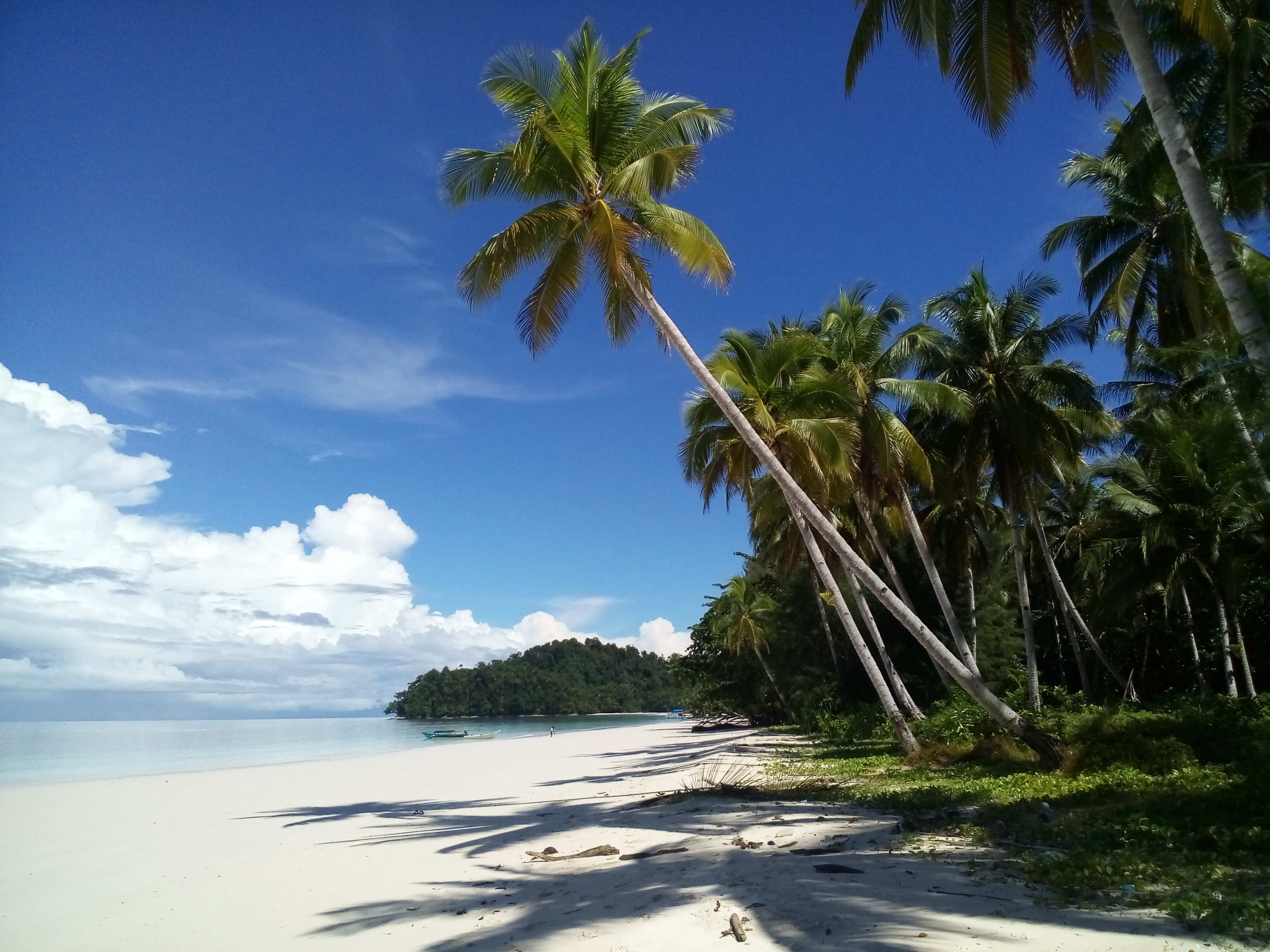 Sisi Lain Pantai Wayob di Pulau Panjang Fakfak (doc.Aldi Bimantara)